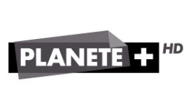 Logo von Planete+ HD